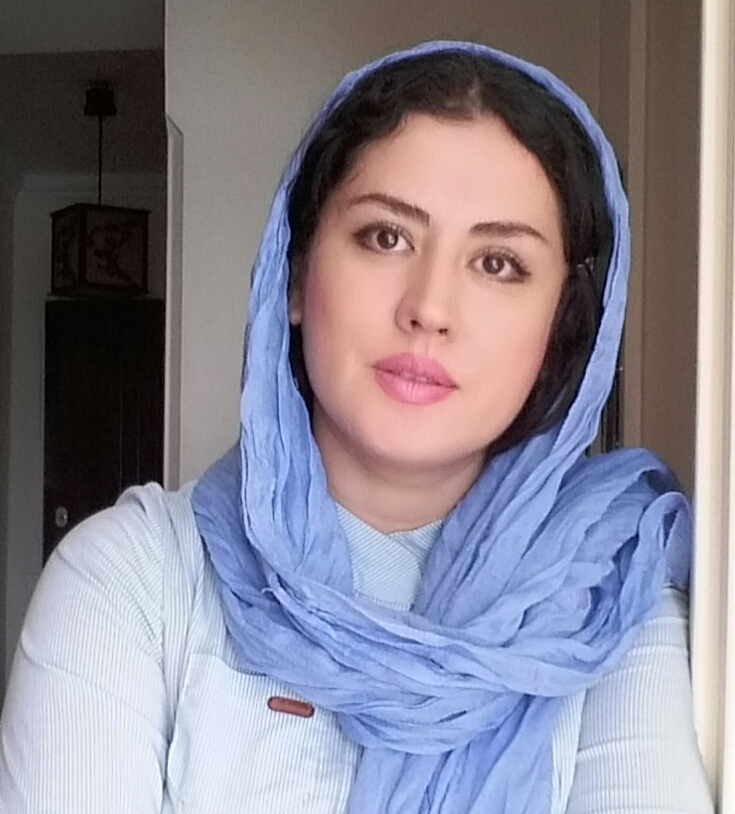 Shahla Zarlaki